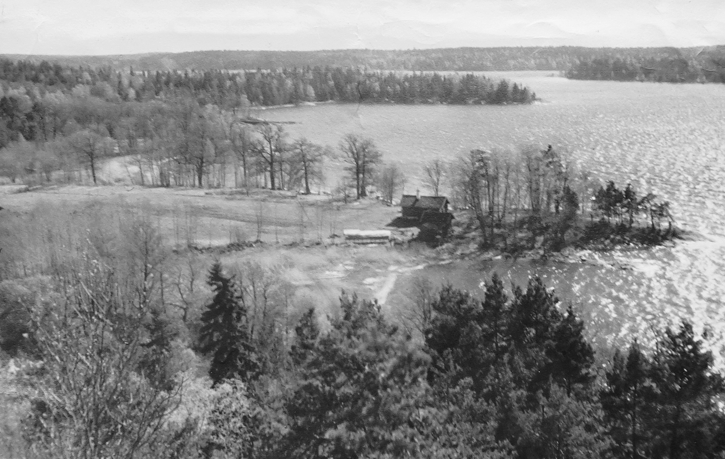 Frösvik, torpet Fågelsången och viken "Fågelgäspan", vy från Kranberget